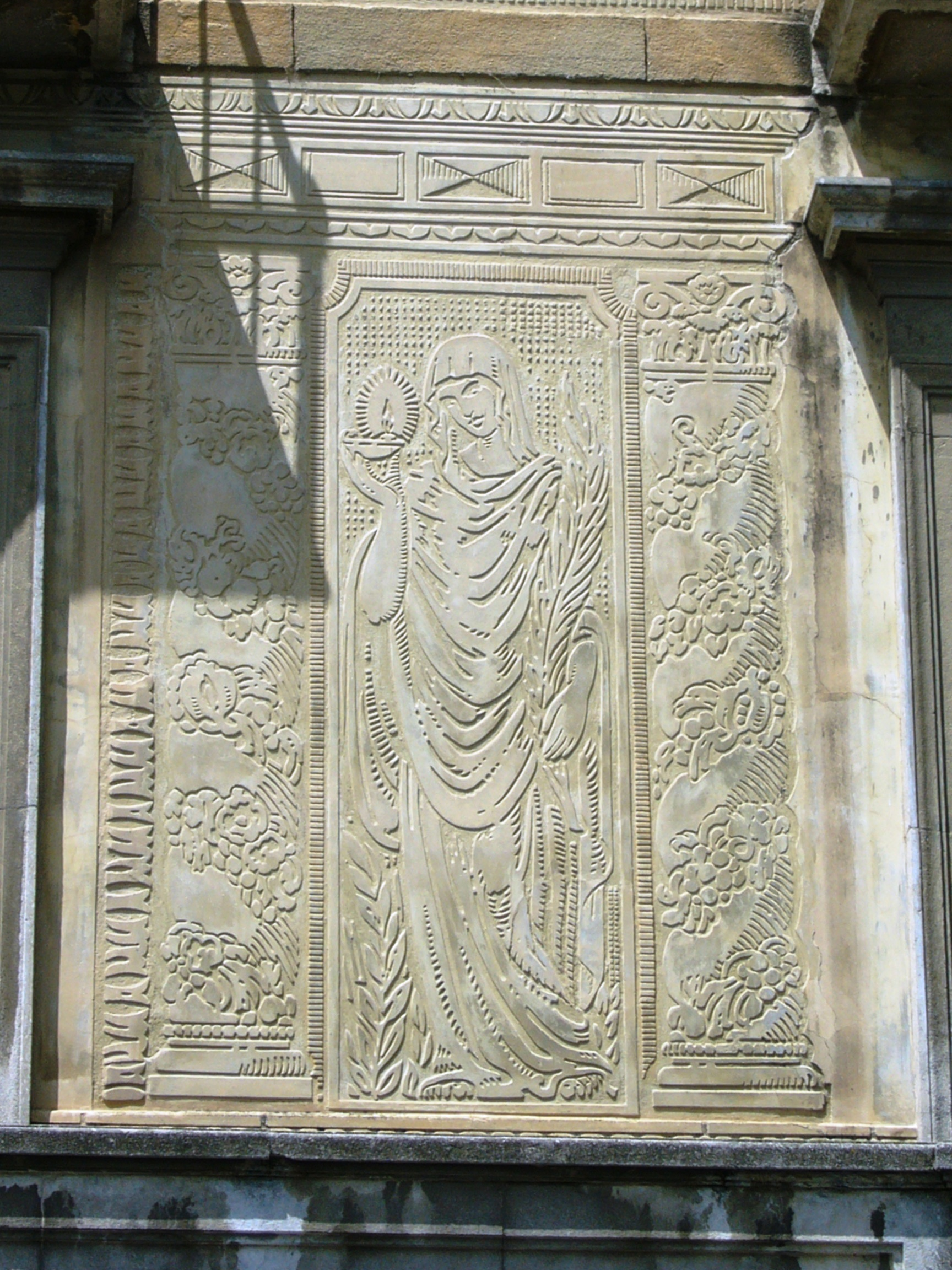 Edifici de cinc pisos